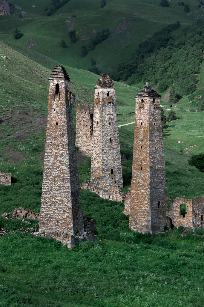 Башни в древнем ингушском городе Ний (Джейрахский район, Ингушетия)